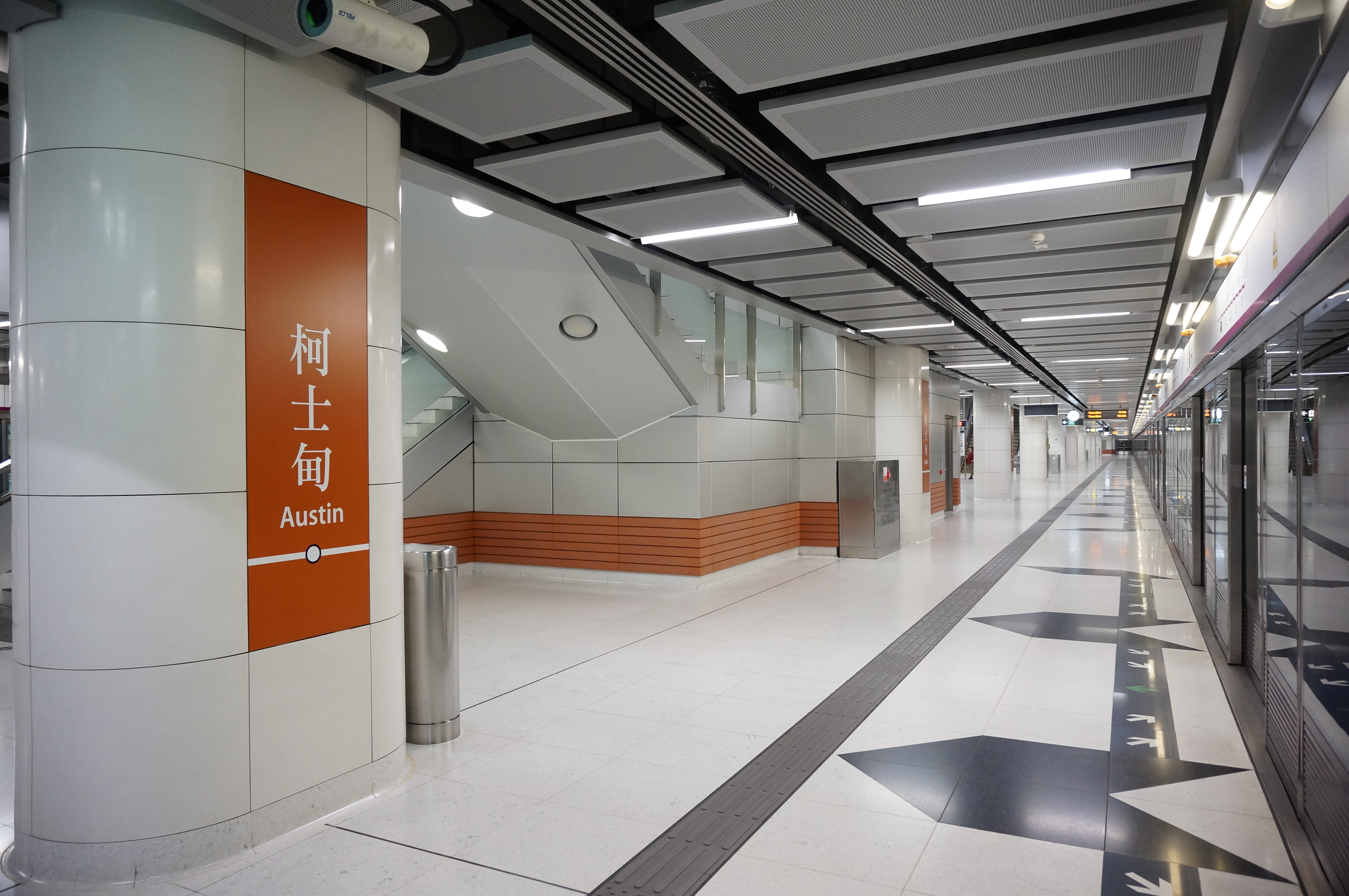 港鐵柯士甸站月台